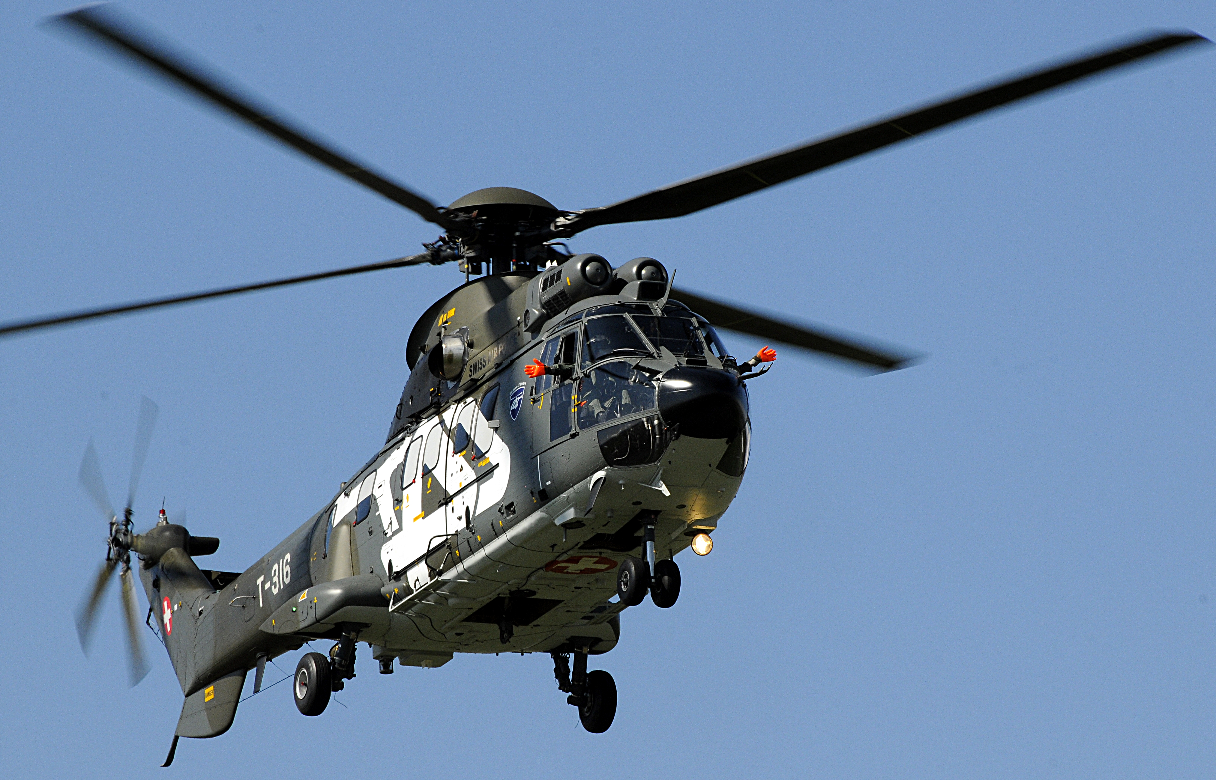 Air 14 Payerne Switzerland